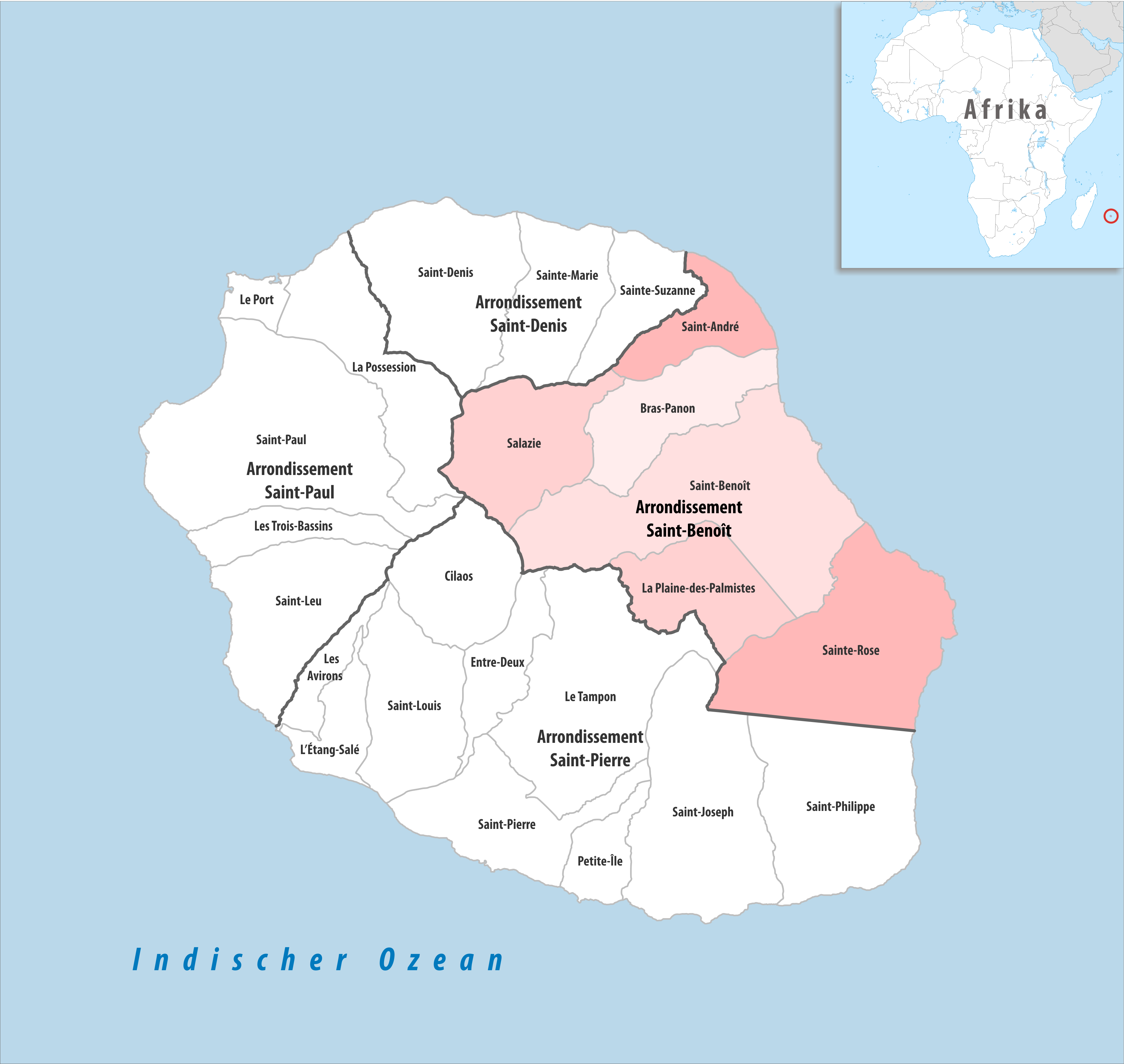 Lage des Arrondissements Saint-Benoît